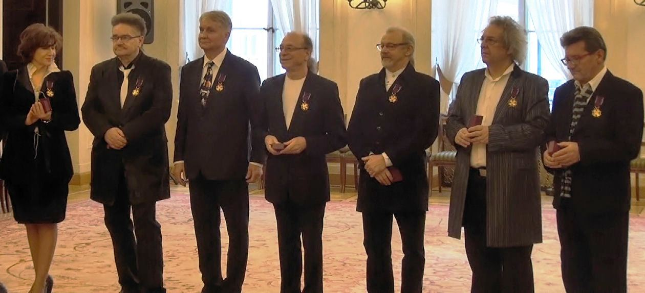 Aleksander Nowacki dostaje Złoty Krzyż Zasługi od Macieja Klimczaka, podsekretarza stanu w Kancelarii Prezydenta RP. Osoby na zdjęciu to (od lewej): Halina Frąckowiak, Wojciech Kędziora (Wojciech Korda), Piotr Miks, Aleksander Nowacki, Jerzy Skrzypczyk, Tadeusz Woźniak, Jacek Zieliński